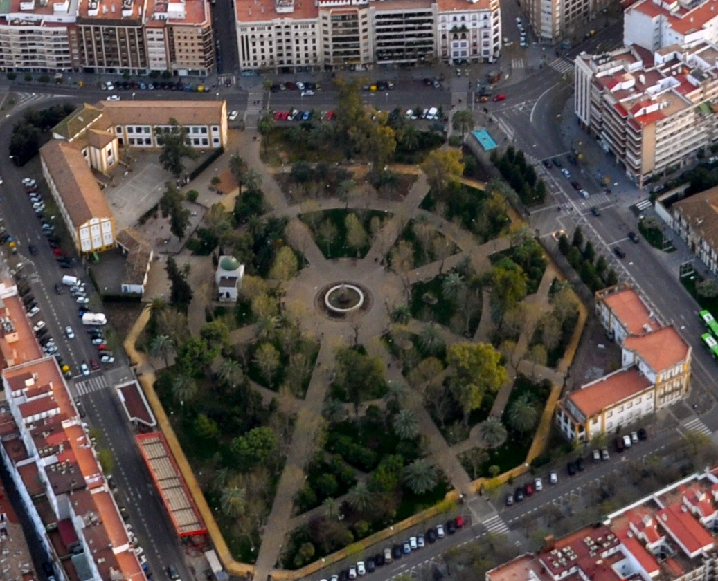 Vista aérea de Córdoba (España).